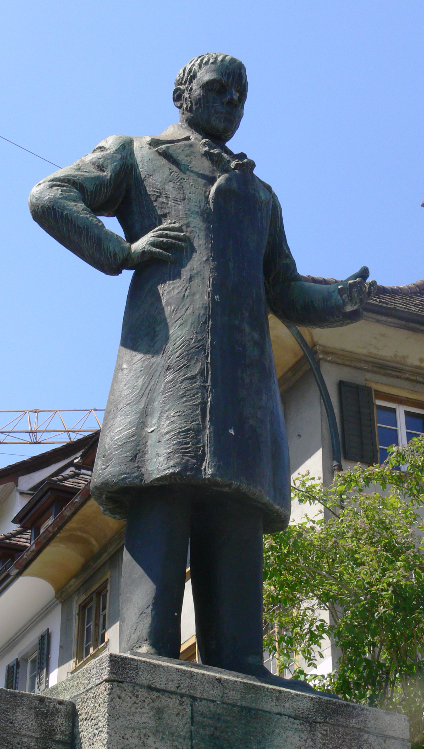 Schaffhausen, Denkmal für Johann Conrad Fischer (1773–1854), Gründer der Stahlwerke im Mühlental, erster Stadtpräsident von Schaffhausen